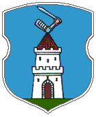 Herb osiedla tupu miejskiego Ostryna